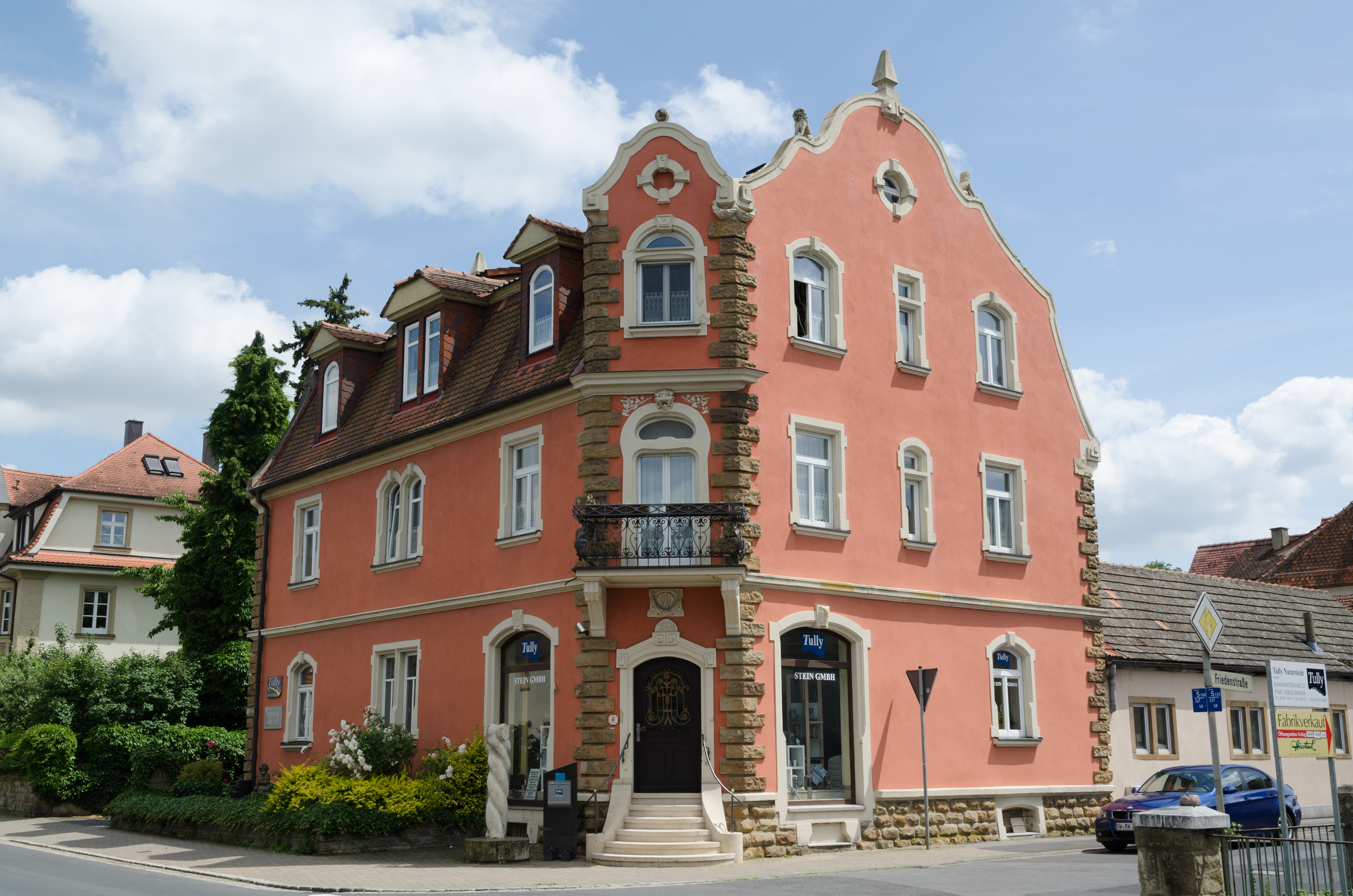 Gerolzhofen, Bahnhofstraße 23